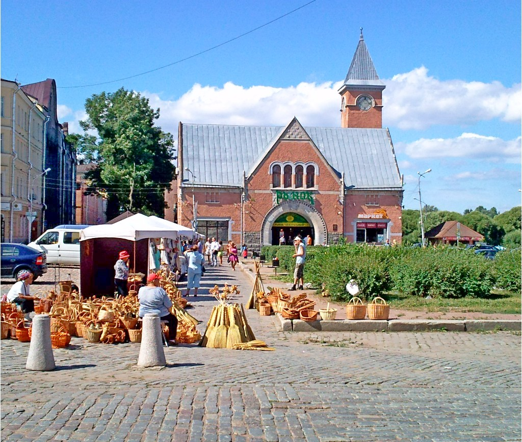 Рыночная площадь.